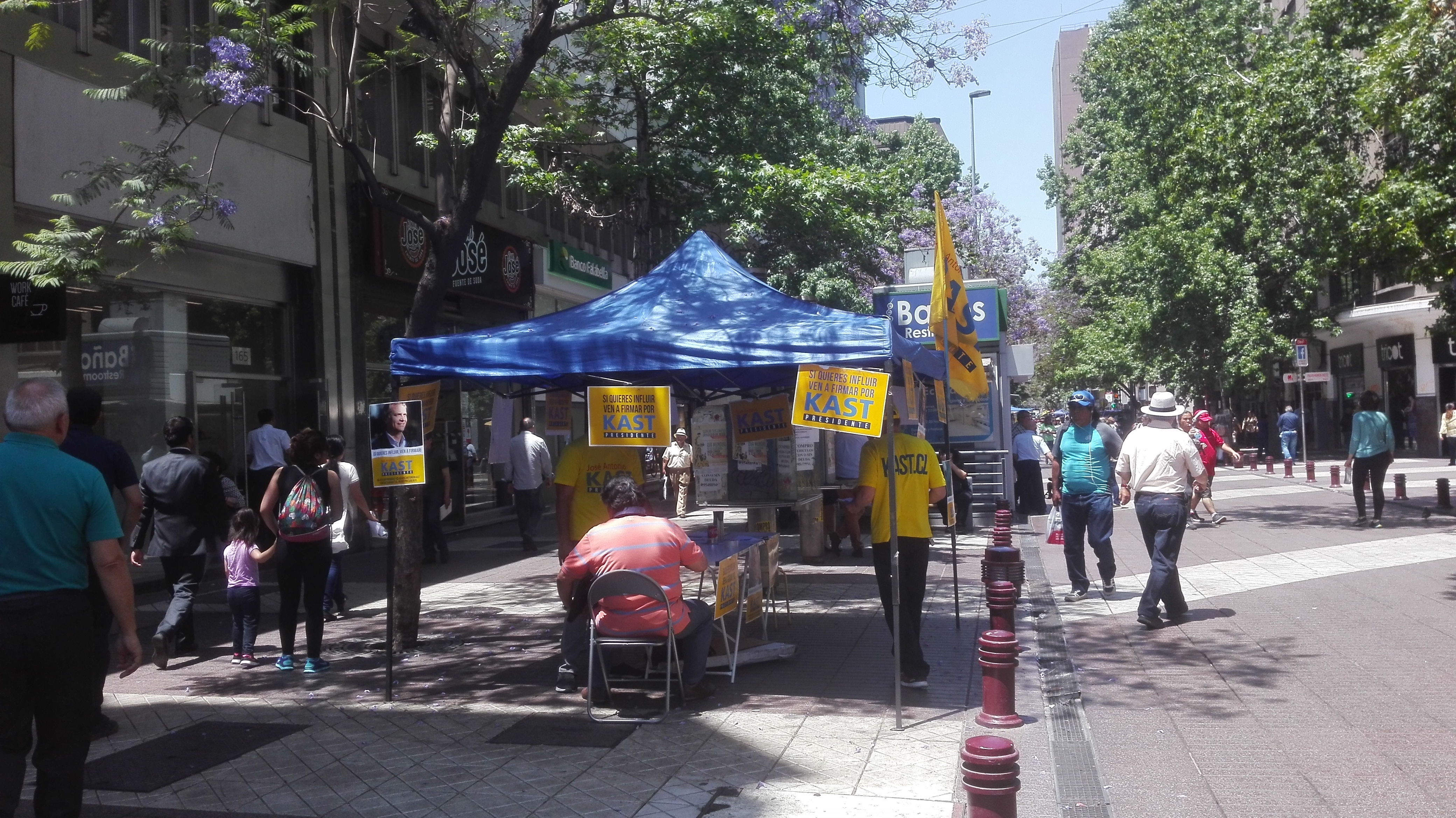 Recolección de firmas para la candidatura presidencial de José Antonio Kast, Paseo Estado, Santiago